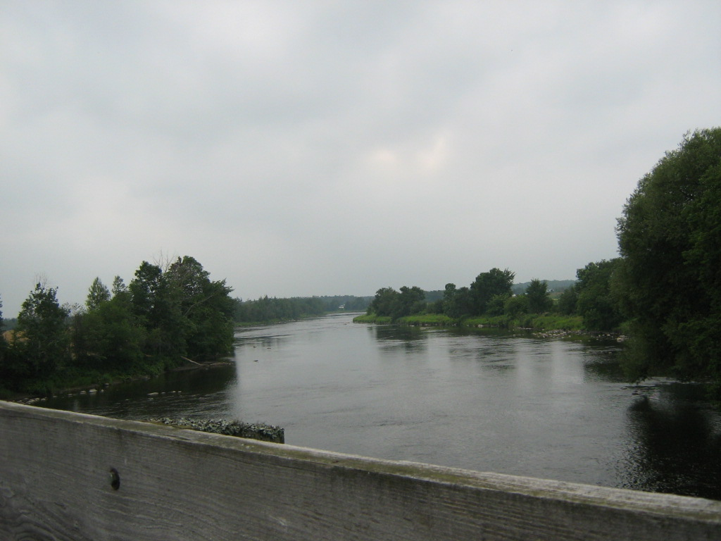 rivière Bécancour à Lyster.